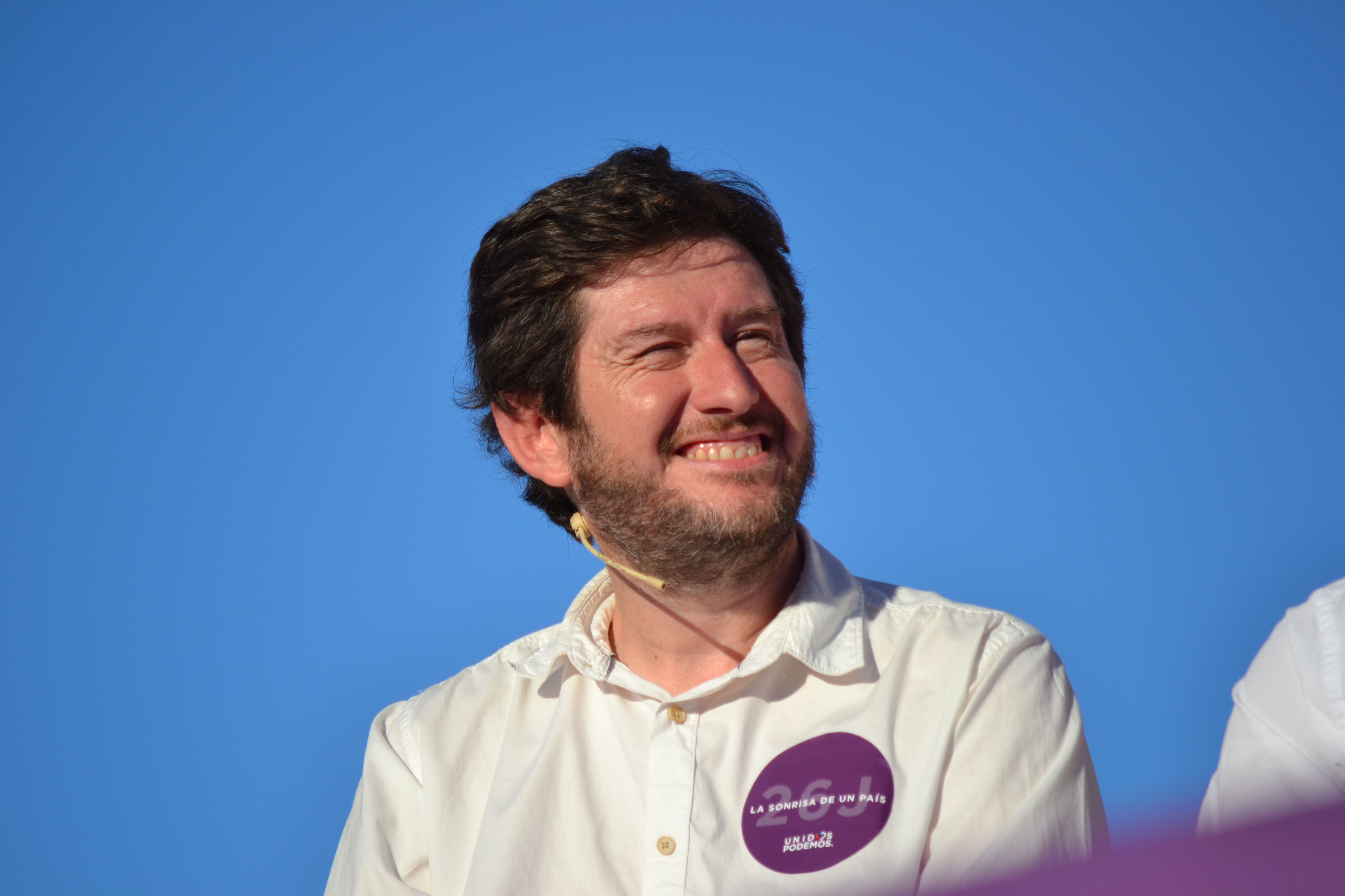 Alberto Jarabo, líder de Podem a les Illes Balears, al míting central de campanya d'Units Podem MÉS (2016)